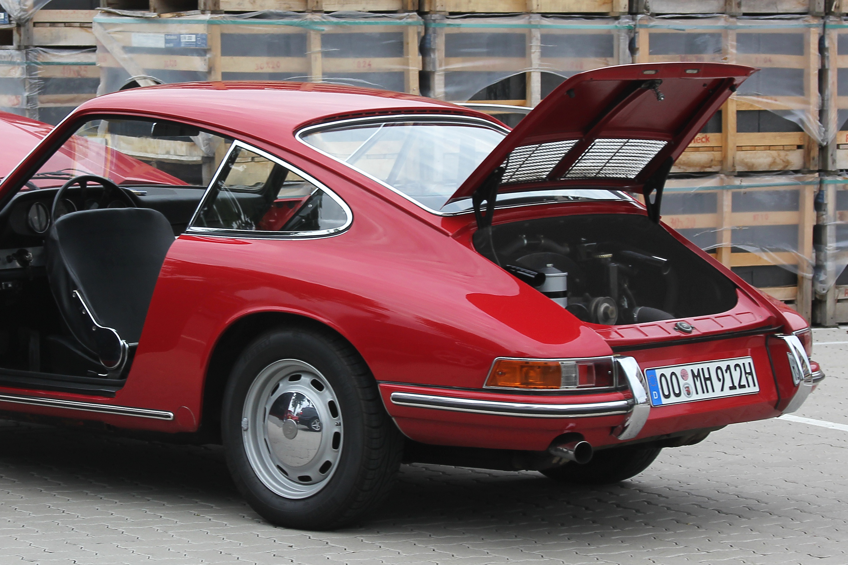 Porsche 912, 4-Zylinder-Boxermotor, 90 PS; Bauzeit 1965 bis 1969 (Kennzeichen des Fahrzeugs verändert)